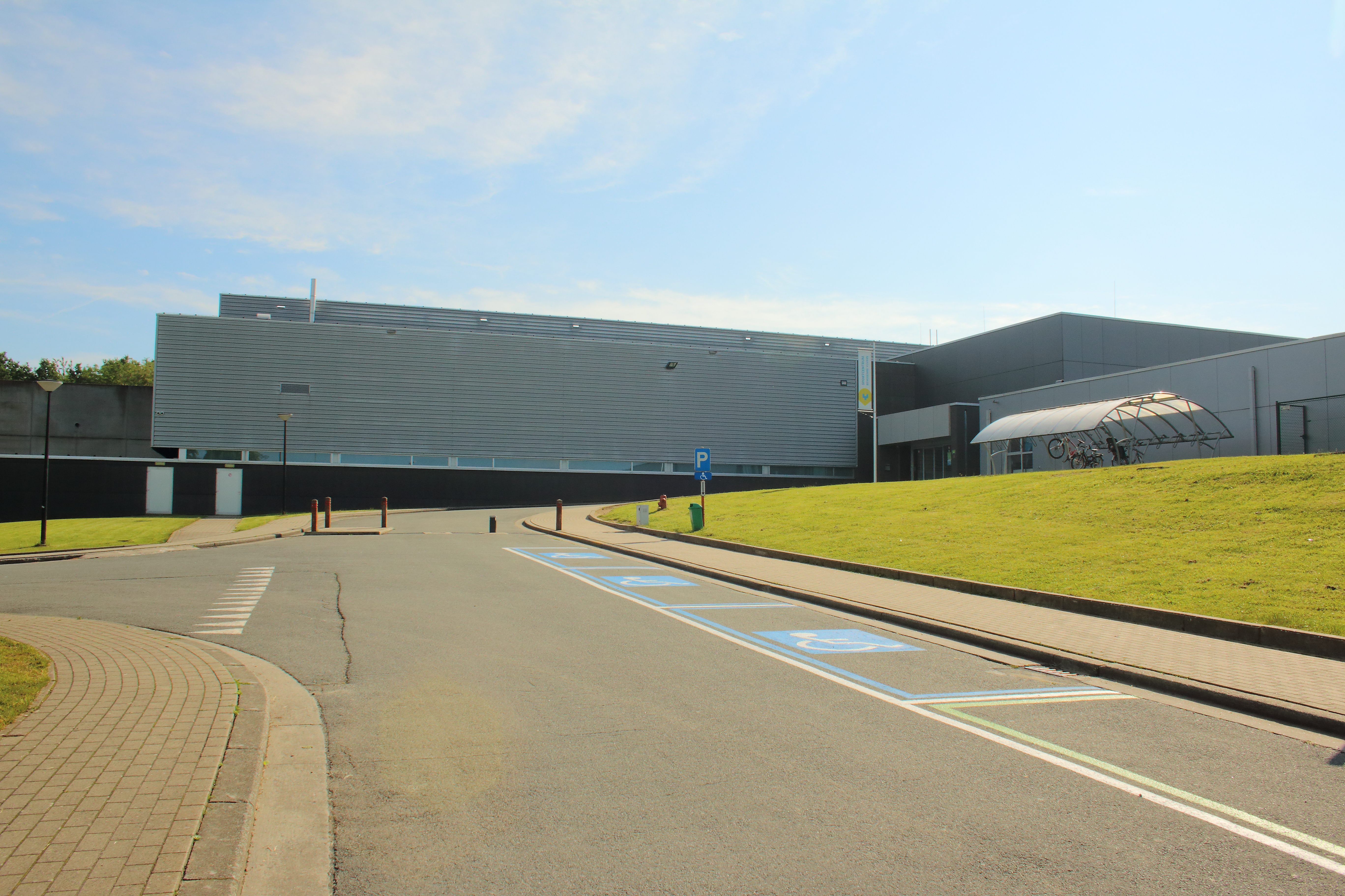 stedelijk sportcentrum 'Bevegemse Vijvers', Zottegem, Vlaanderen, België